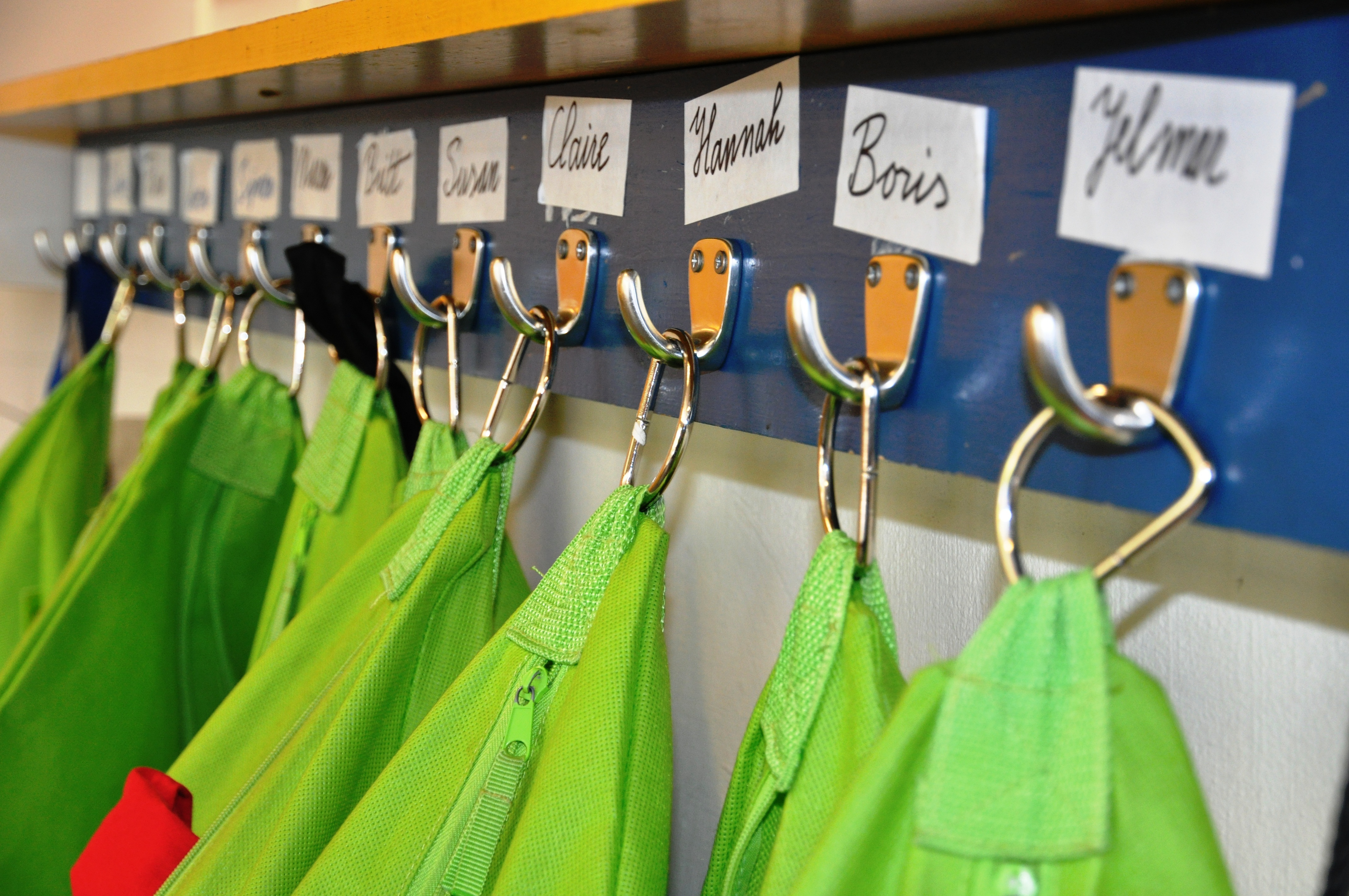 Kapstok met luizencapes op de Werkplaats Kindergemeenschap in Bilthoven.